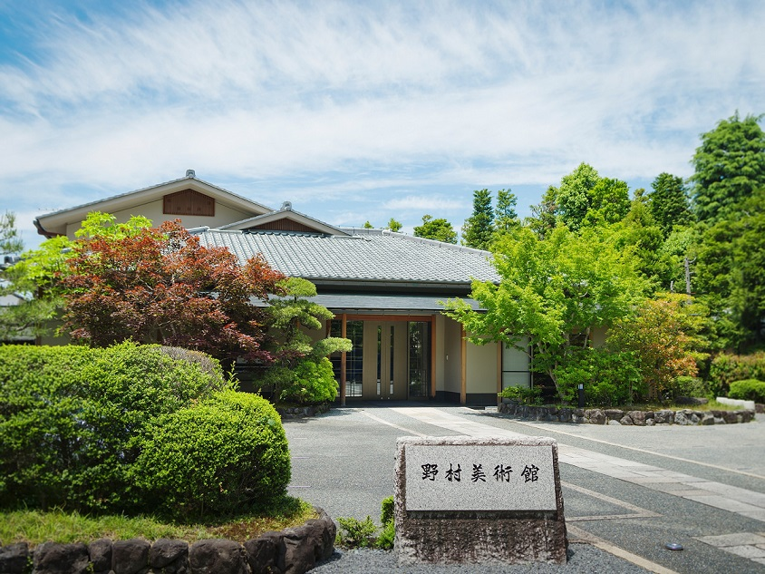 野村美術館、京都市左京区